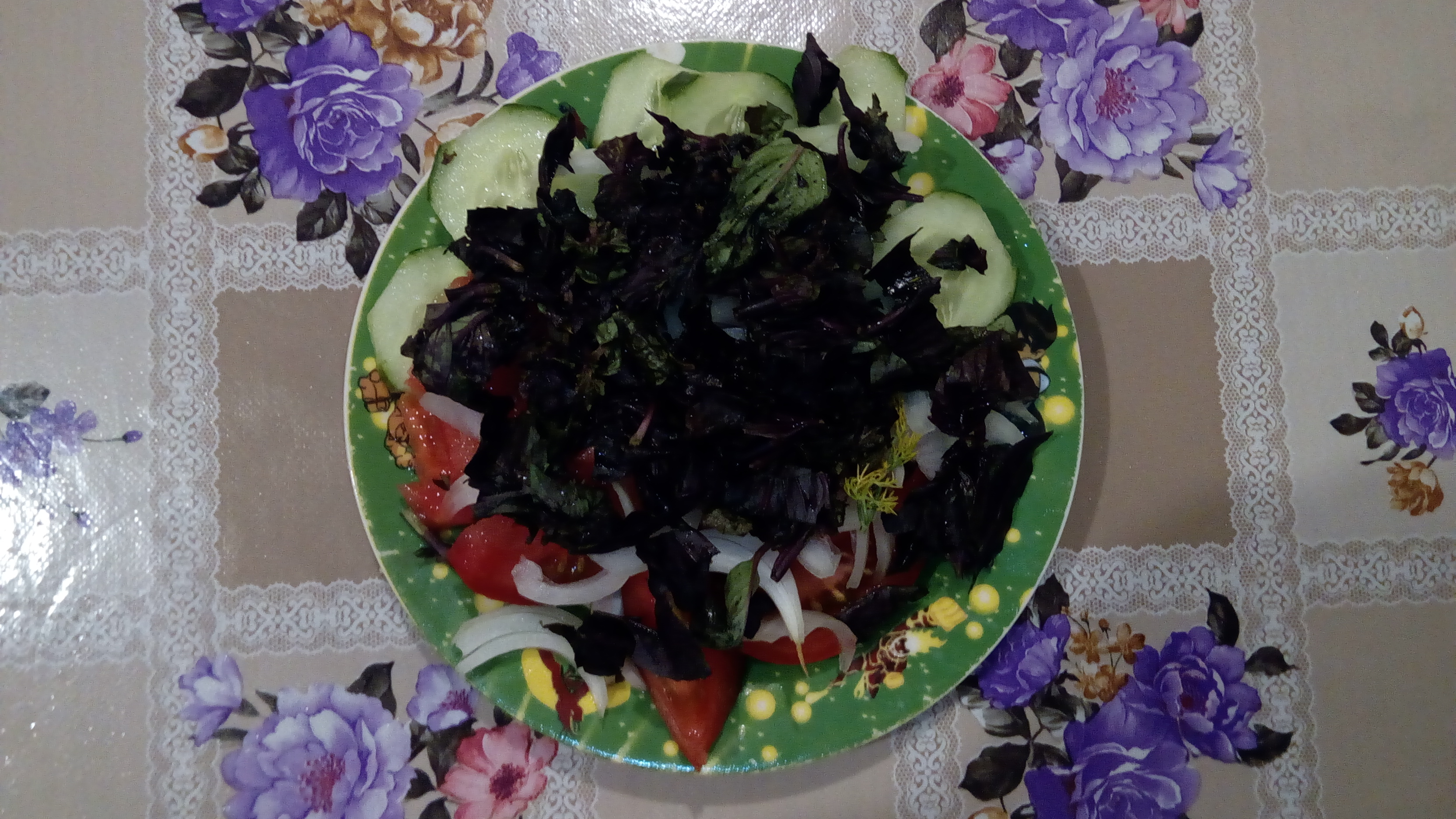 Boşqabda bol reyhanlı çoban salatı